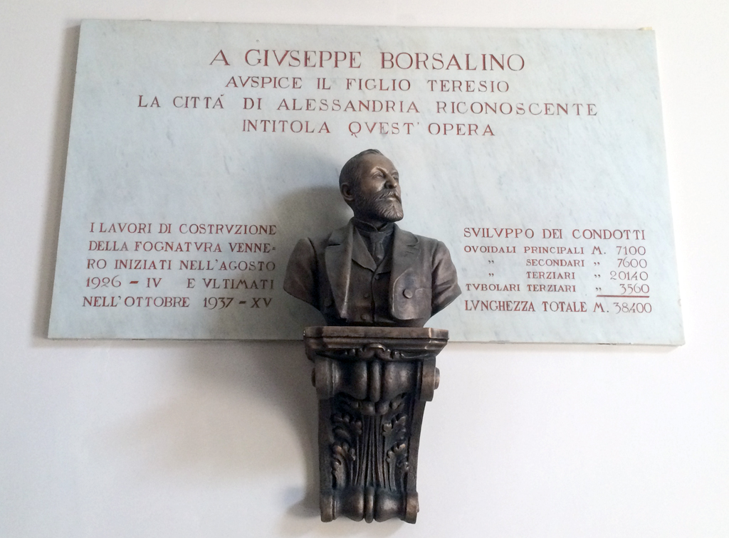 Lapide commemorativa a Giuseppe Borsalino per i lavori di costruzione della fognatura di Alessandria. Conservata presso il palazzo del Comune di Alessandria